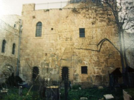 A droite, blocs du mur du diakonikon de la Sainte-Sion dans l'ancienne mosquée Nebi Daoud, vue de l'extérieur (façade orientale). Noter la fenêtre en haut à gauche, donnant sur la "chambre haute" (le lieu de la Pentecôte).